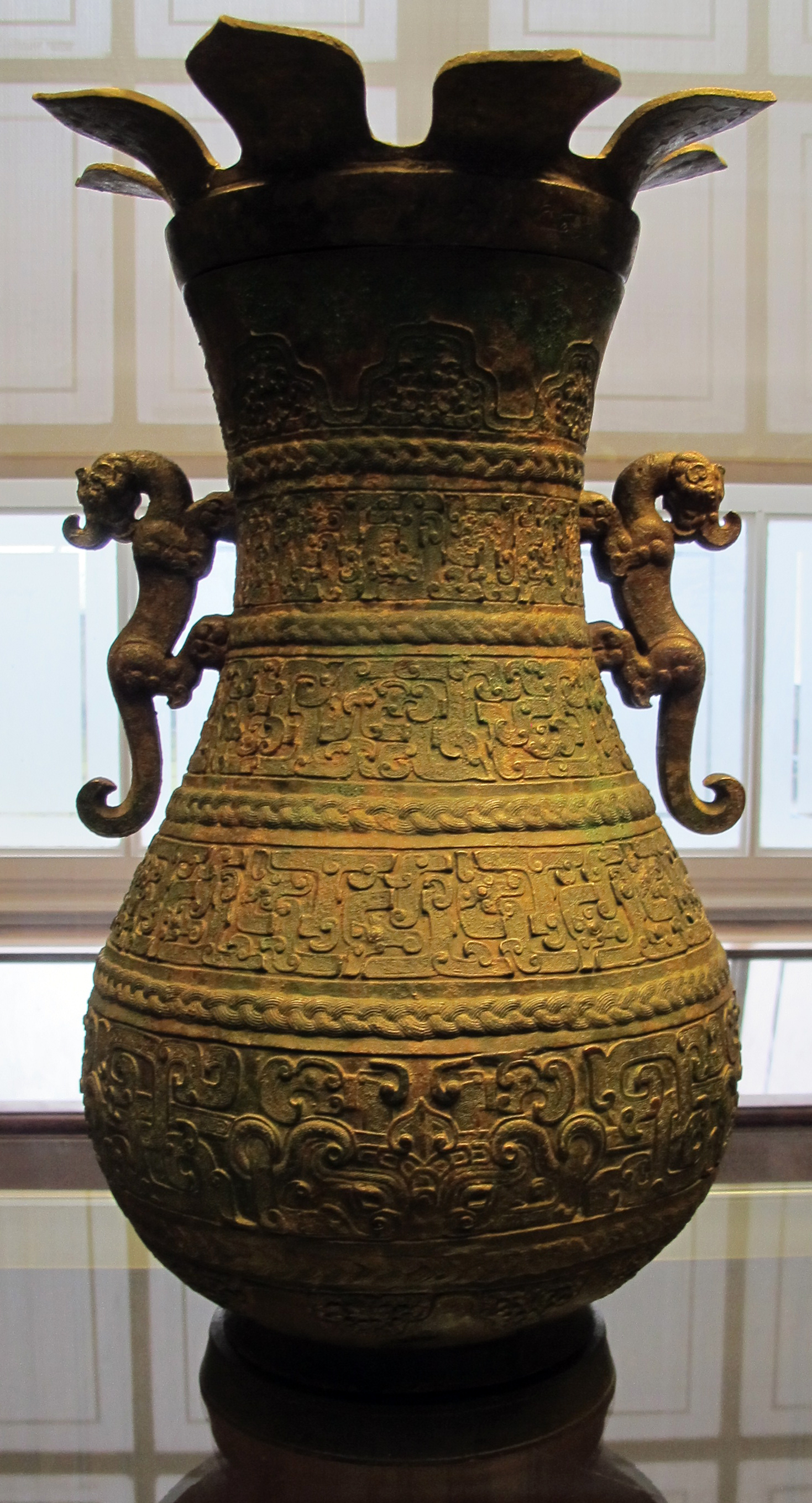 Periodo degli zhou dell'est, coppia di vasi rituali hu. V sec. ac.